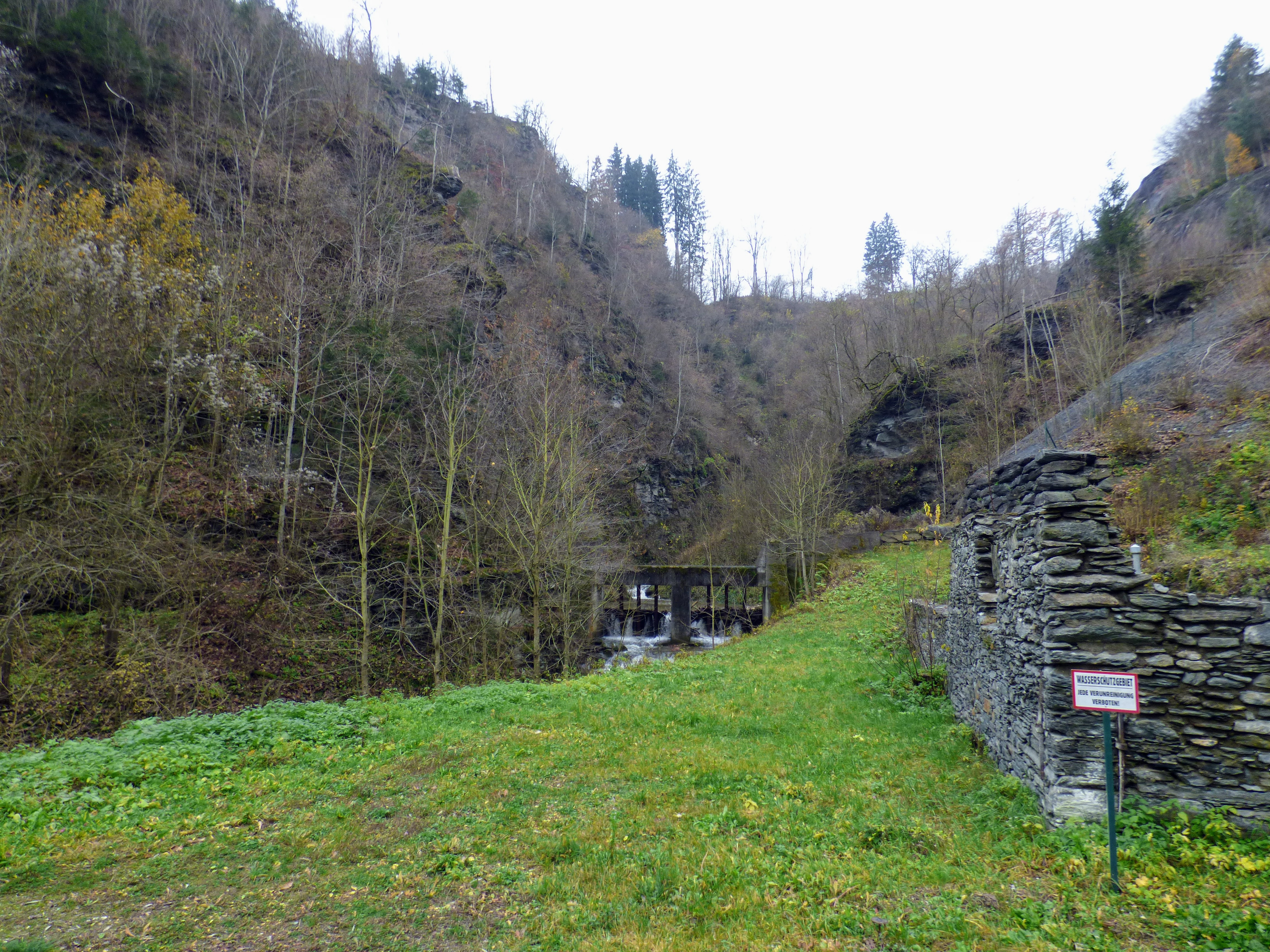 Feistritzbach (Zubringer zur Glan), in der Feistritzklamm oberhalb von Liebenfels, mit Gebäuderuine